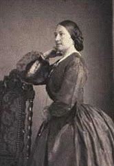 Mezzosopranen Vilhelmine Leocadie Gerlach (1827-1919)